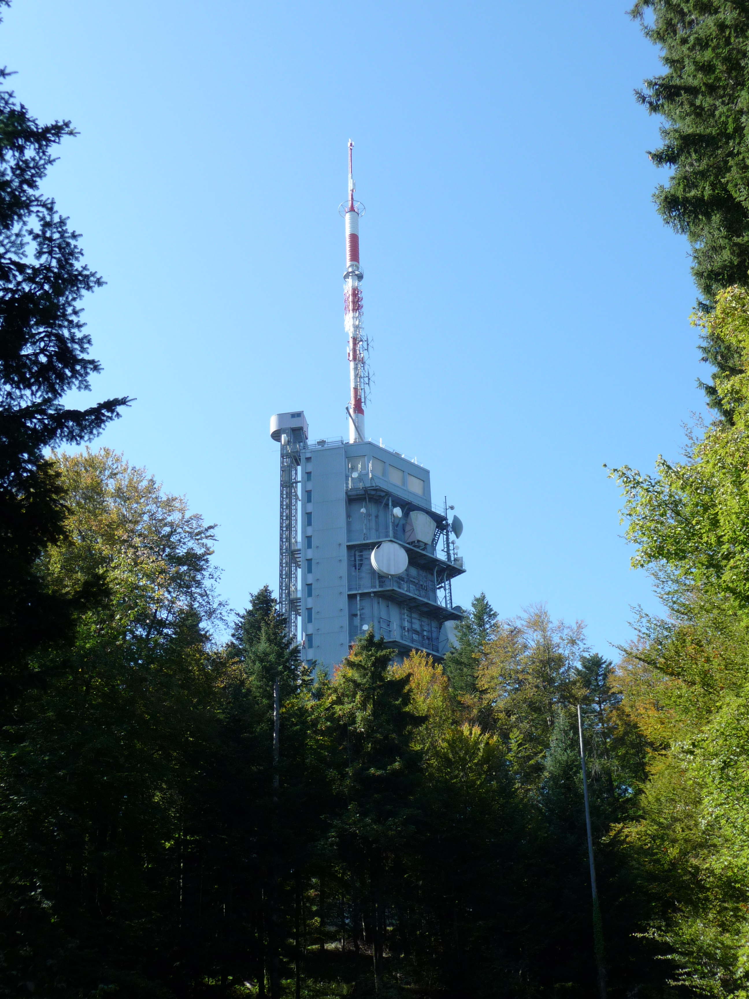 Der Fernsehturm Mont Pèlerin in der Schweiz.